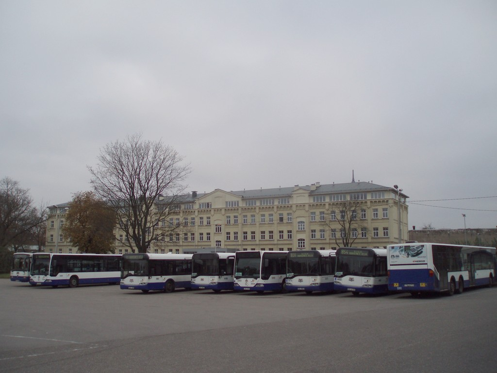 Rīgas Satiksmes autobusu parks Abrenes ielā. 2007. g.